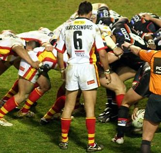 Dragons Catalans-Bradford Bulls à Perpignan